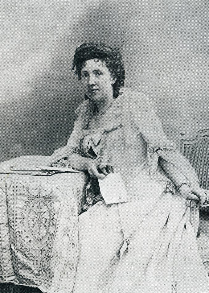 Jeanne Laisné in the role of Aurore in the première run of Le portrait de Manon